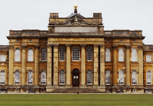 Blenheim Palace